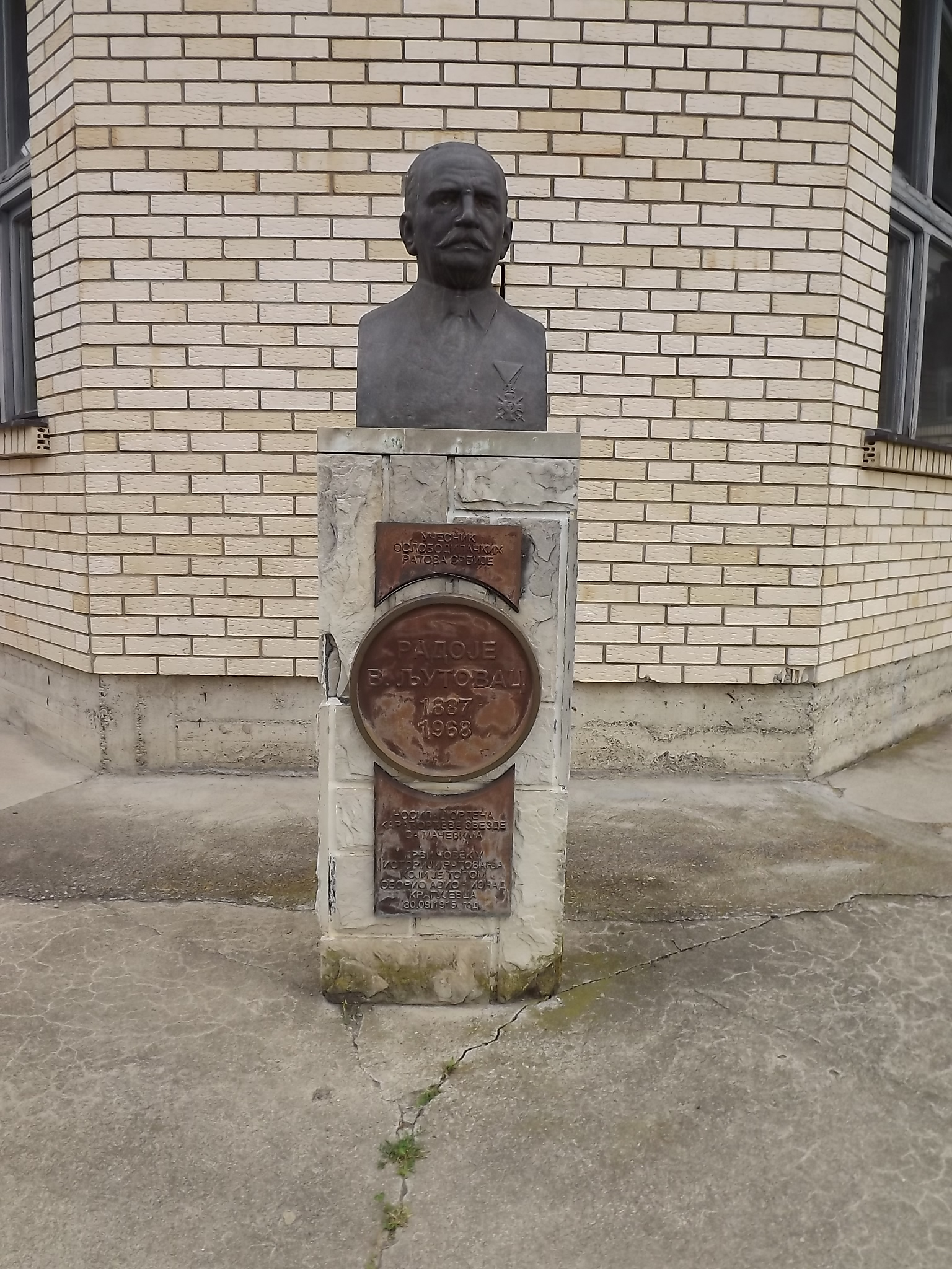 Spomenik borcima u oslobodilačkim ratovima, selo Poljna. Fotografija nastala u okviru saradnje Narodnog univerziteta Trstenik, Narodne biblioteke Jefimija i Saveza boraca Trstenik